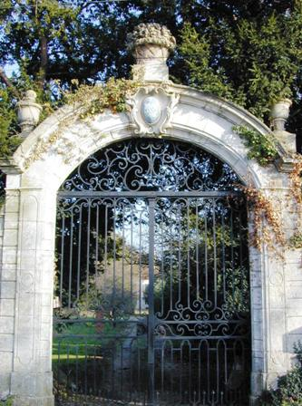 Portail maison abbatiale abbaye de Maizières XIIème siècle - Saône-et-loire